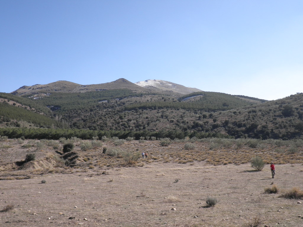 Sierra de los Filabres